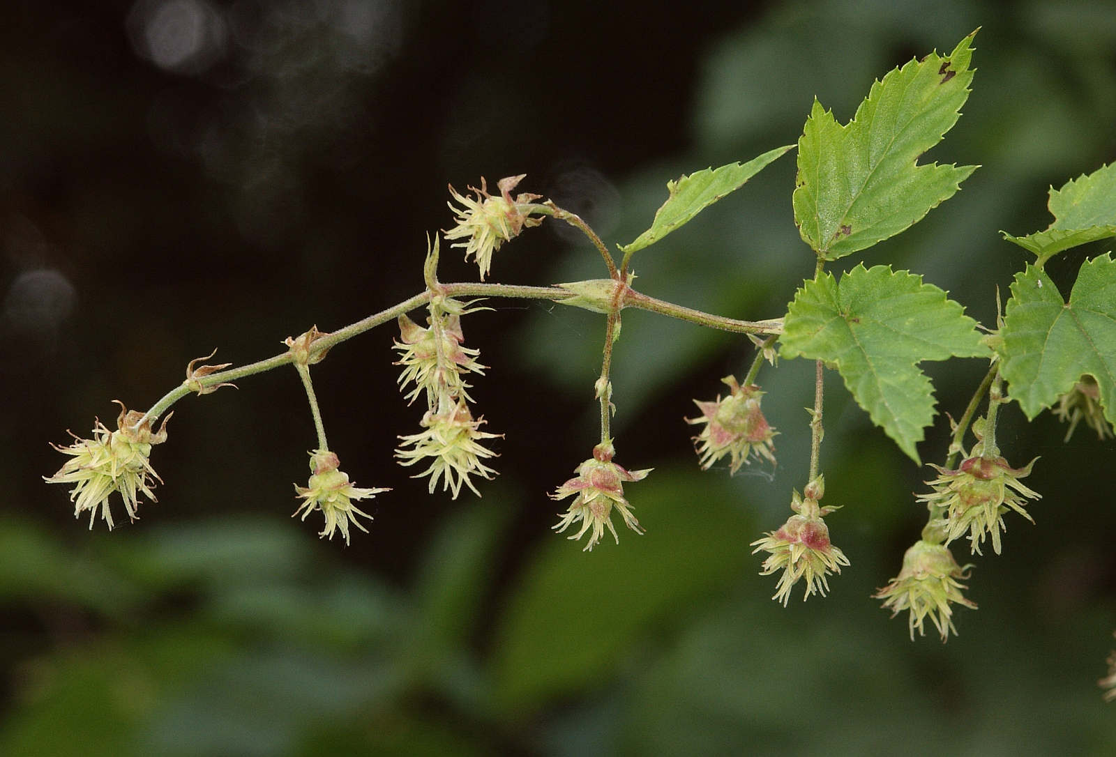 Humulus lupulus, female inflorescence